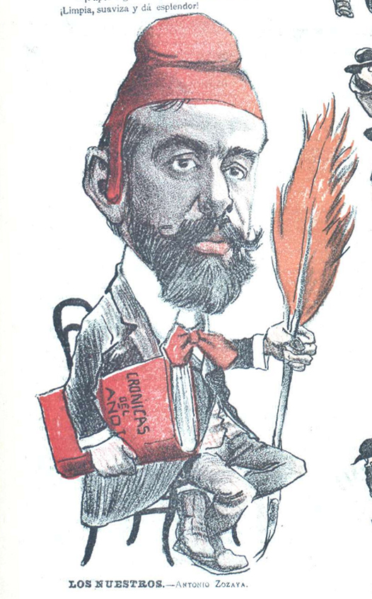 Caricatura.